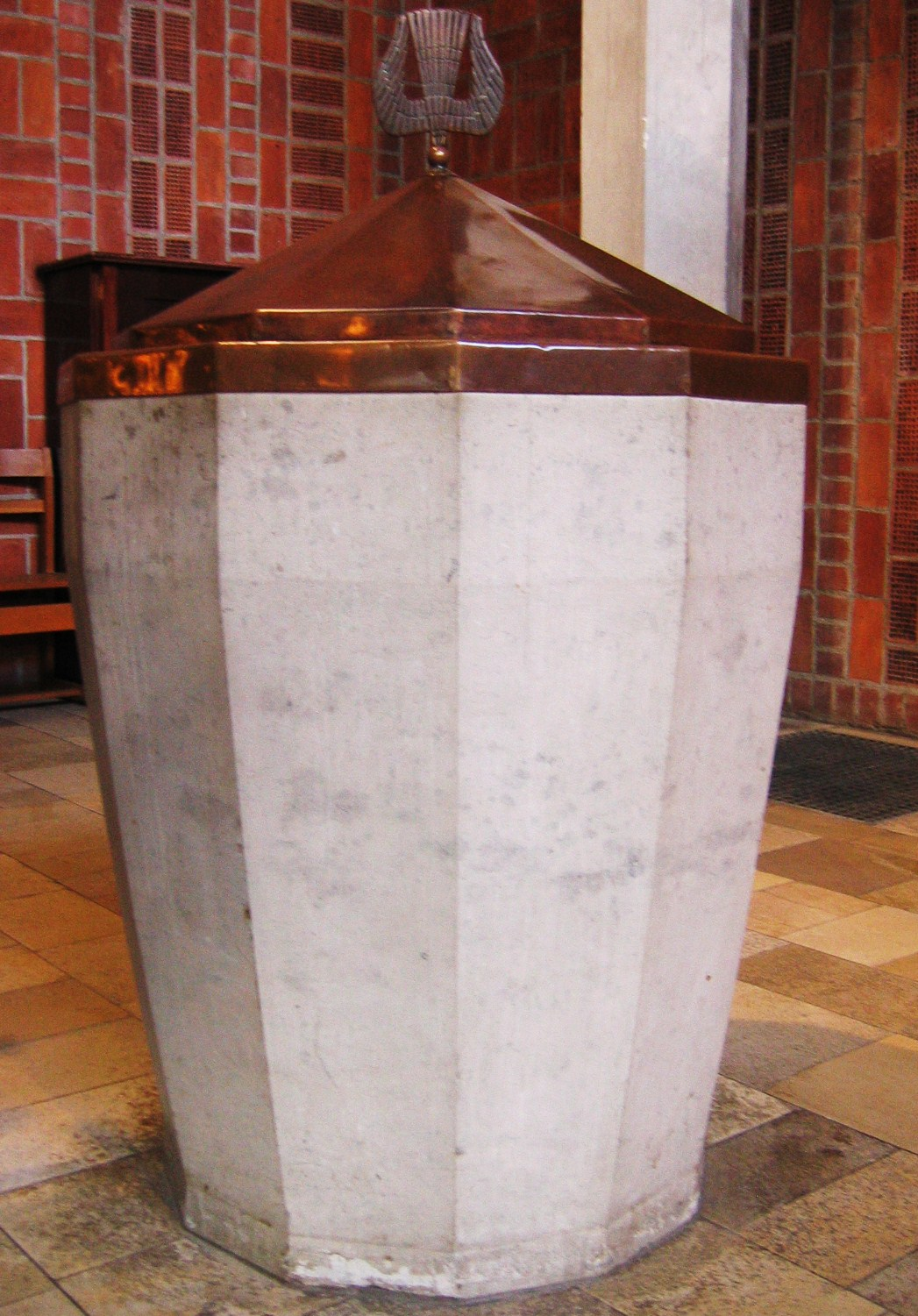 Taufstein der Paul-Gerhardt-Kirche in München.